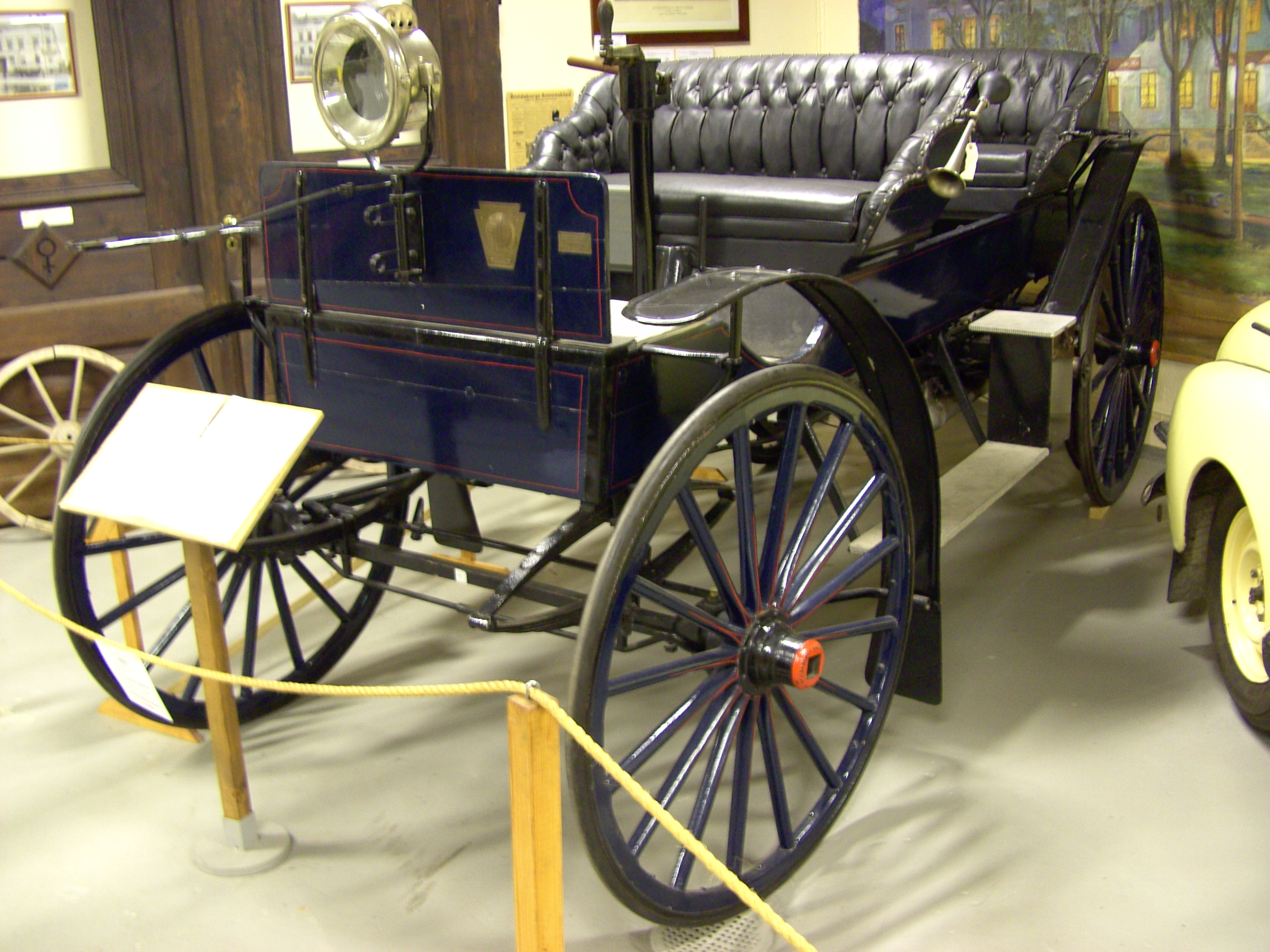 Åtvidabergsbilen, visas i museet, ägs av Tekniska Museet. Serietillverkades av ÅSSA 1911, i Åtvidaberg (ca 15 st)